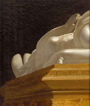 Peinture (detail)